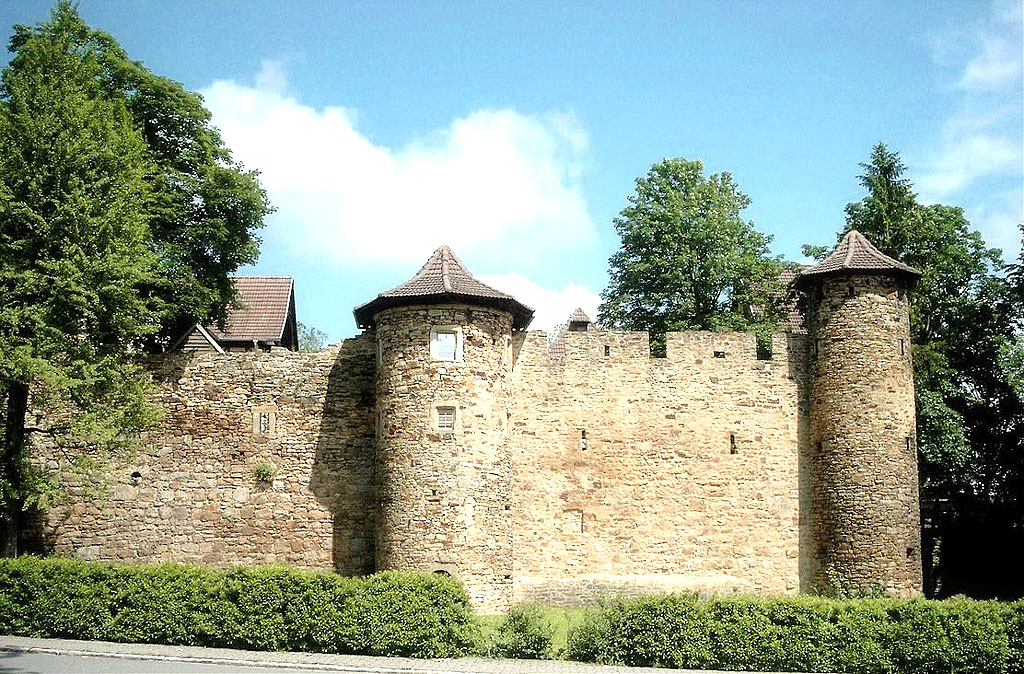 Bibra/Thüringen - Burg